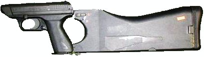 HK VP70M